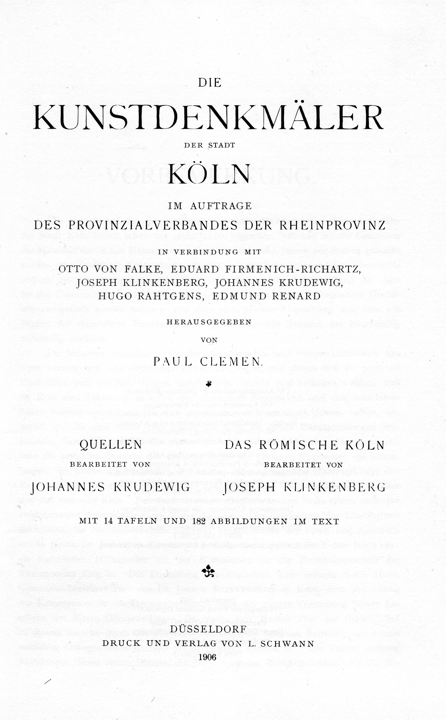 Titeiblatt einer Ausgabe der im Verlag Schwann Düsseldorf erschienenen Reihe „ Die Kunstdenkmäler der Rheinprovinz“ aus dem Jahr 1906